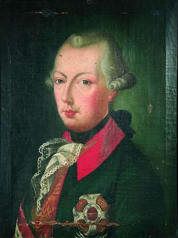 Kaiser Joseph II.label QS:Lde,"Kaiser Joseph II."